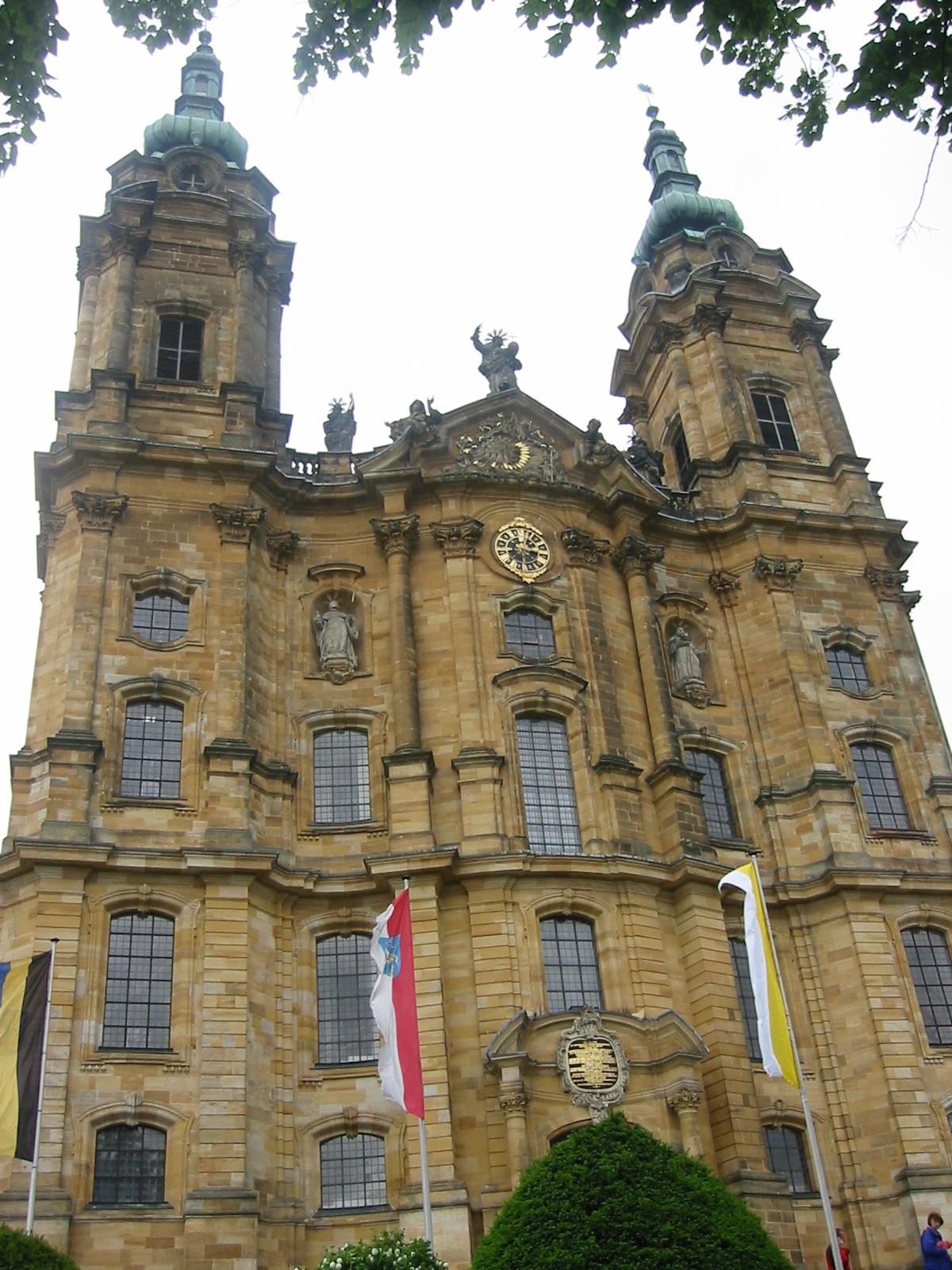 Basilika Vierzehnheiligen - Frontansicht